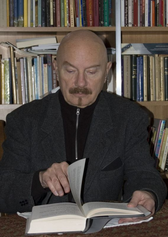 Andrzej Stembarth Sawicki